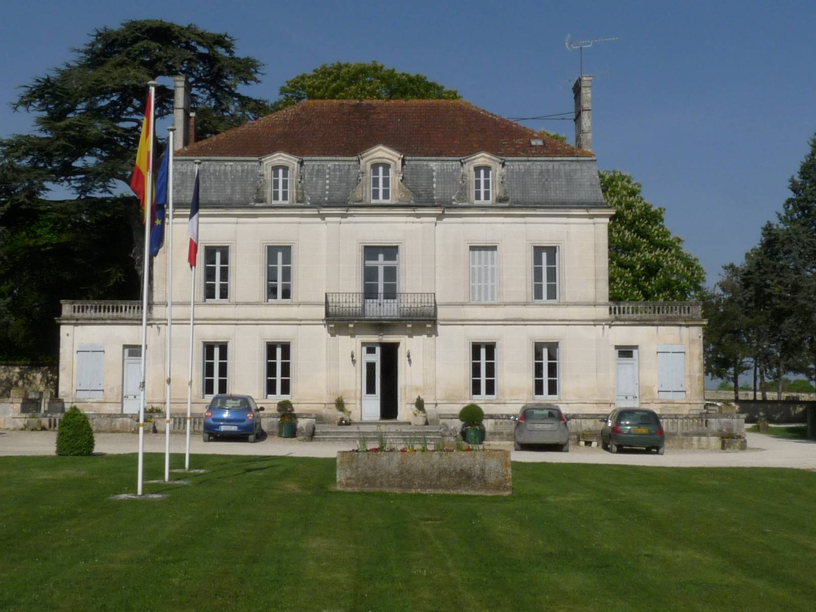 Mairie de Genté, Charente, France